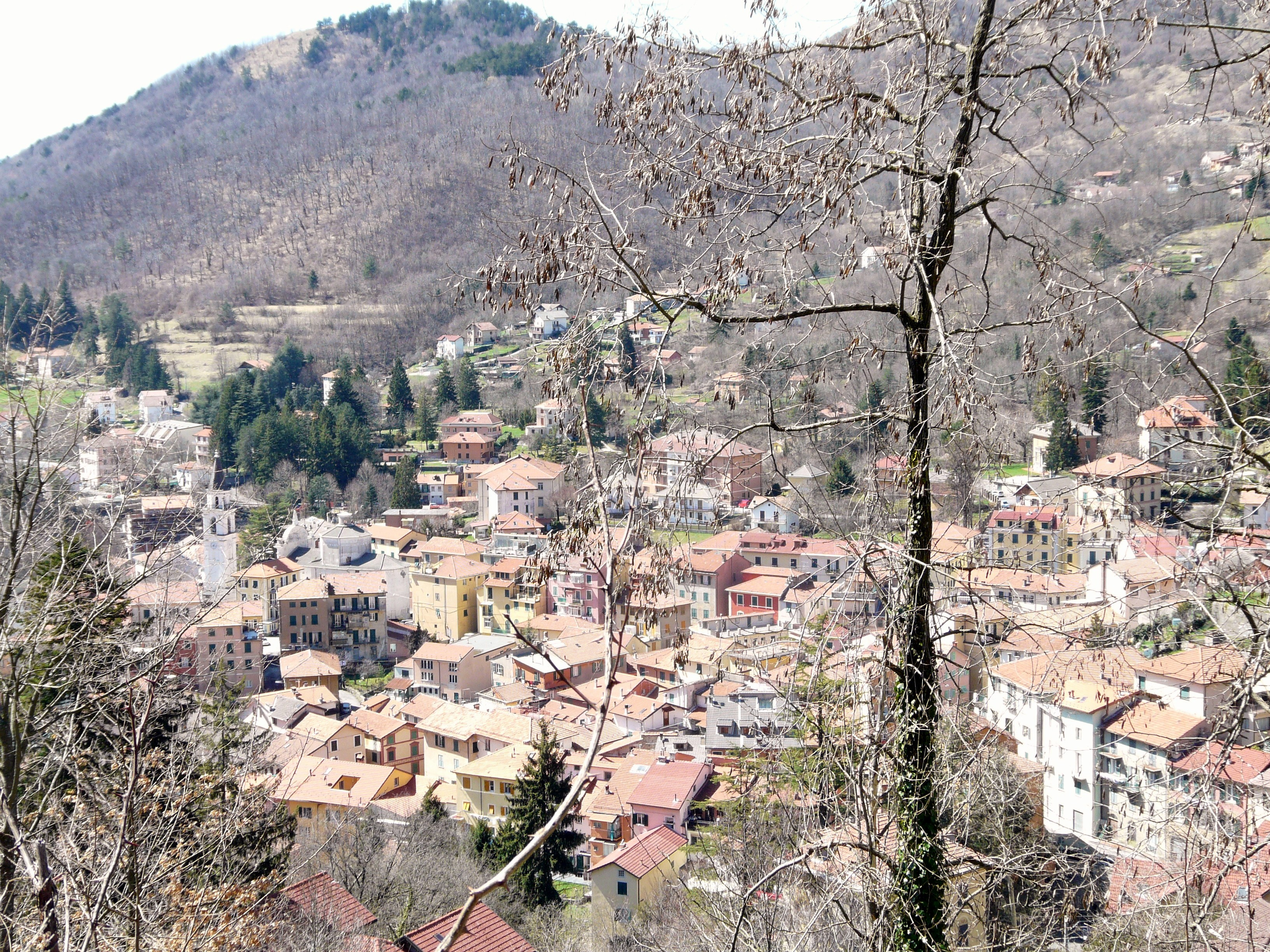 Torriglia, Liguria, Italia